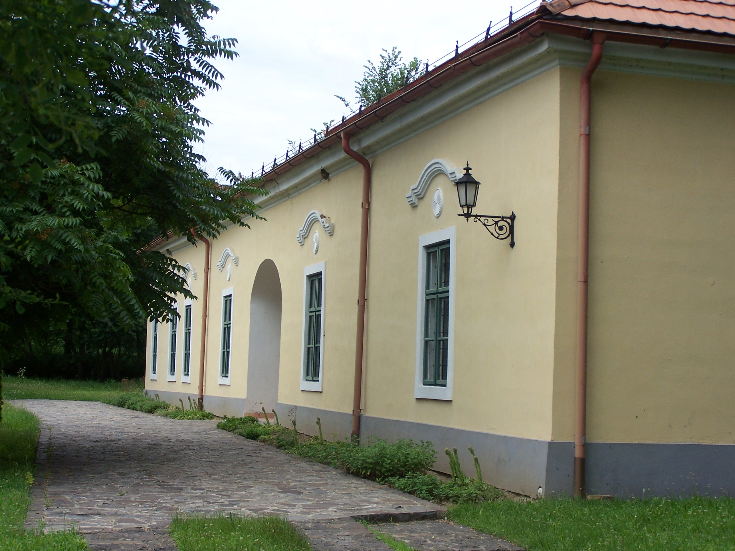 Majláth-kastély (Patvarc, Gyarmati út 86.) This is a photo of a monument in Hungary. Identifier: 6757